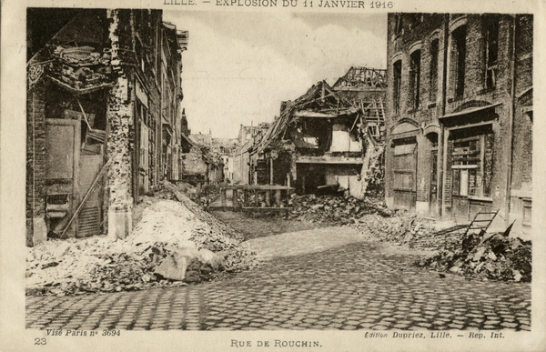 Lille (France - dép. du Nord). Explosion des 18 Ponts, le 11 janvier 1916. Les démolitions dans la rue de "Rouchin" ? → Ronchin. Dimensions : 90 x 140 mm – Technique : impression photomécanique. (carte postale)